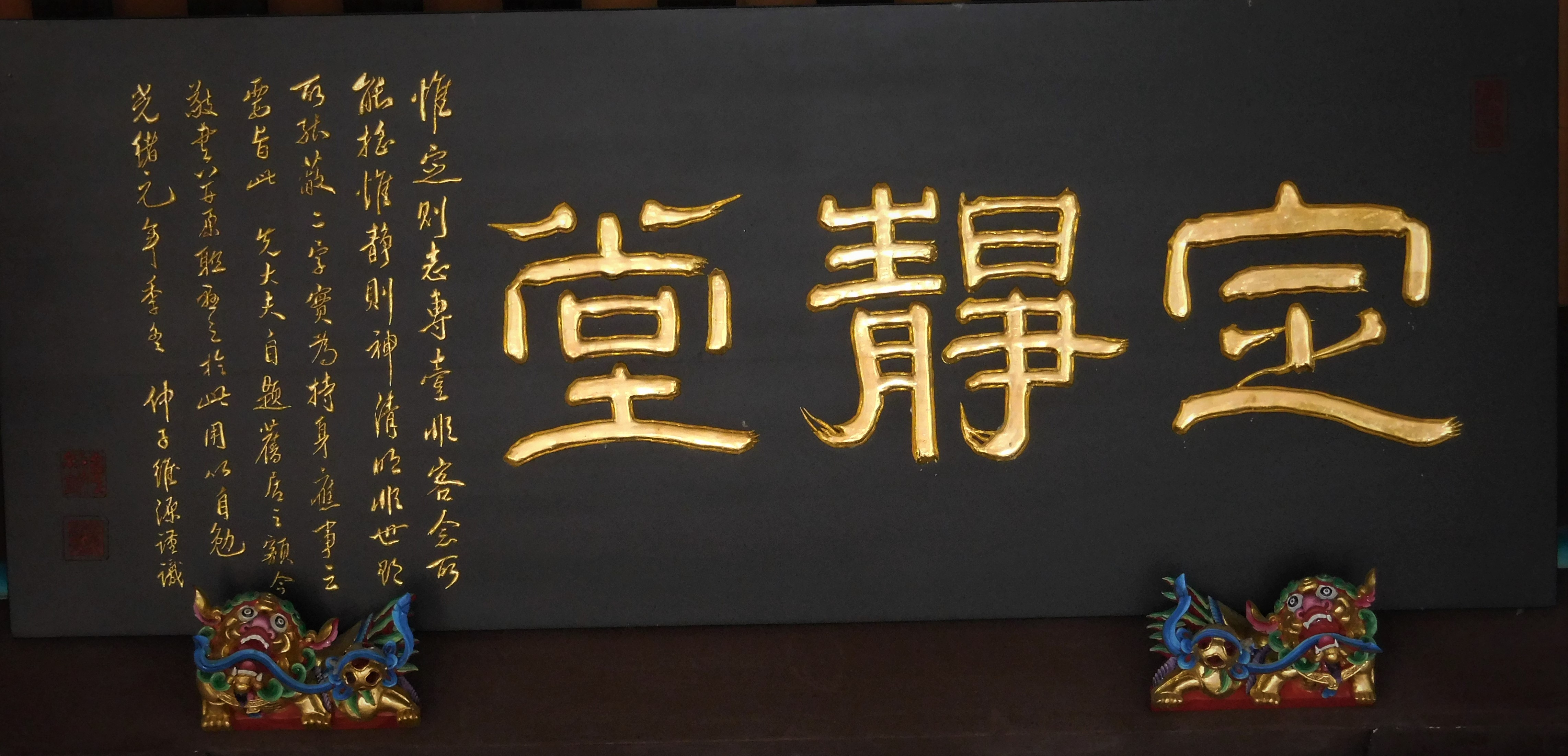 中文（台灣）: 林本源園邸11